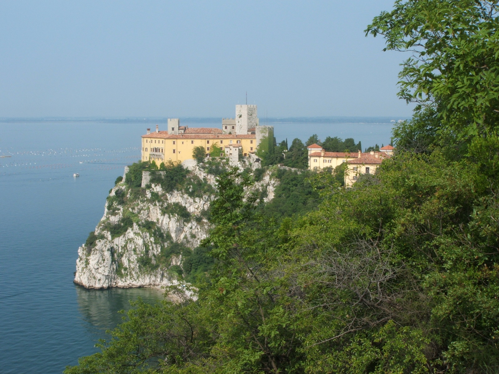 Immagine dal Castello di Duino.